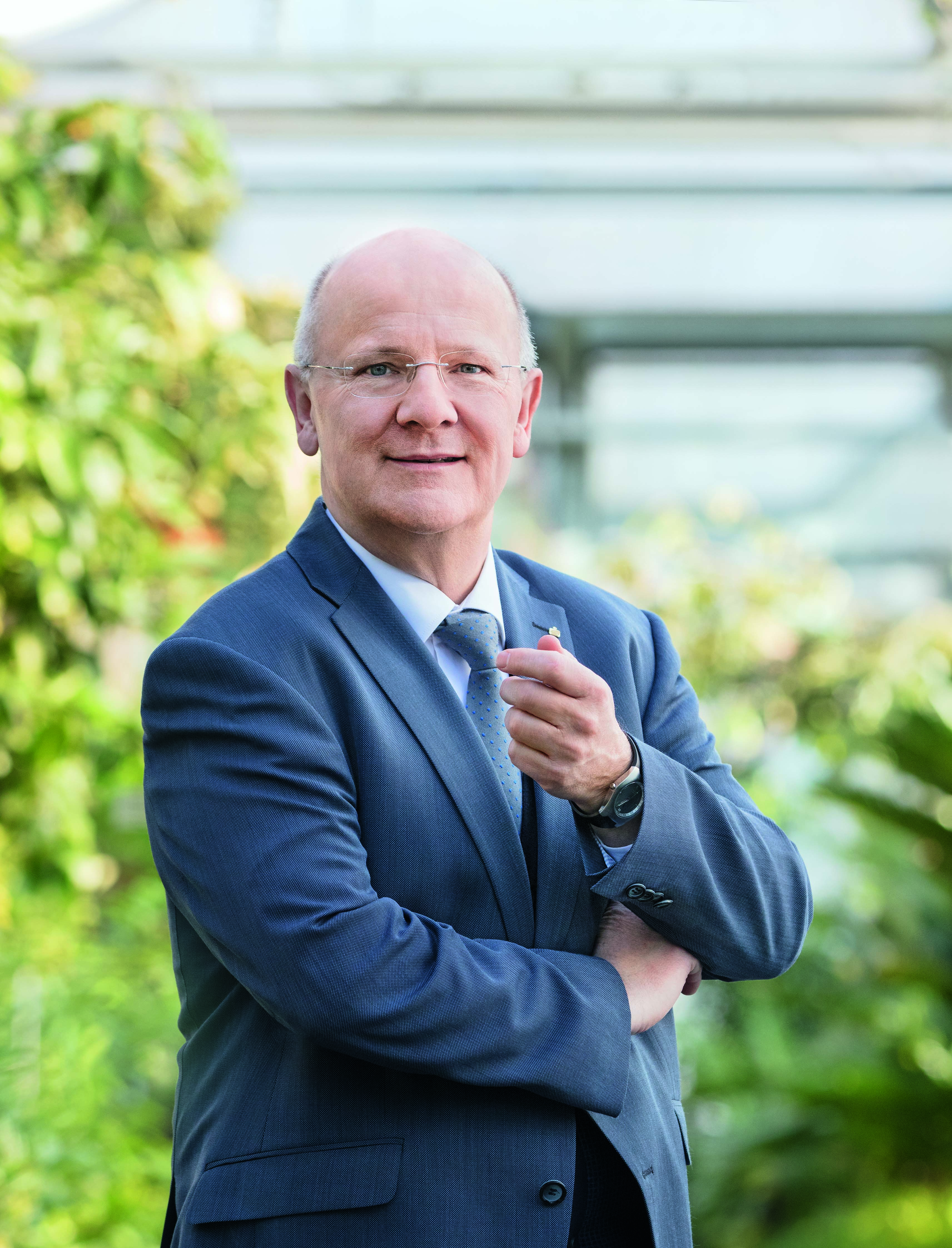 Dr. Michael Rockenschaub (Vorstand Sparkasse OÖ)